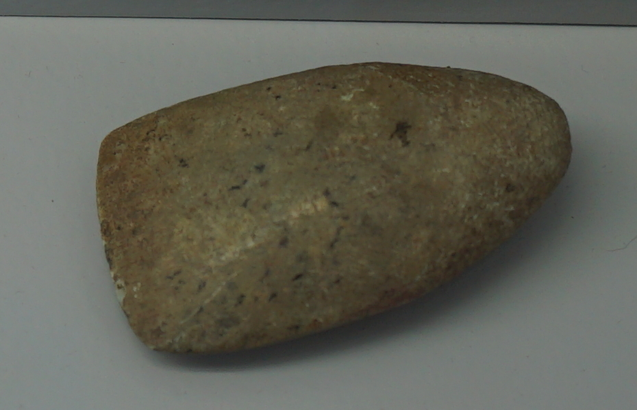 objets du néolithique et du chalcolithique au musée de Toul.